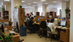 Equipe internationale de la Voix de la Russie